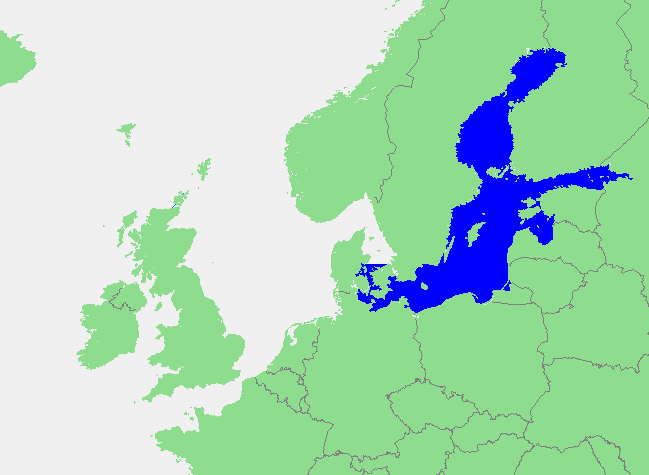 Oostzee / Baltic Sea / 波罗的海